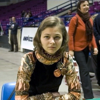 Anna Muzychuk, Warsaw 2006